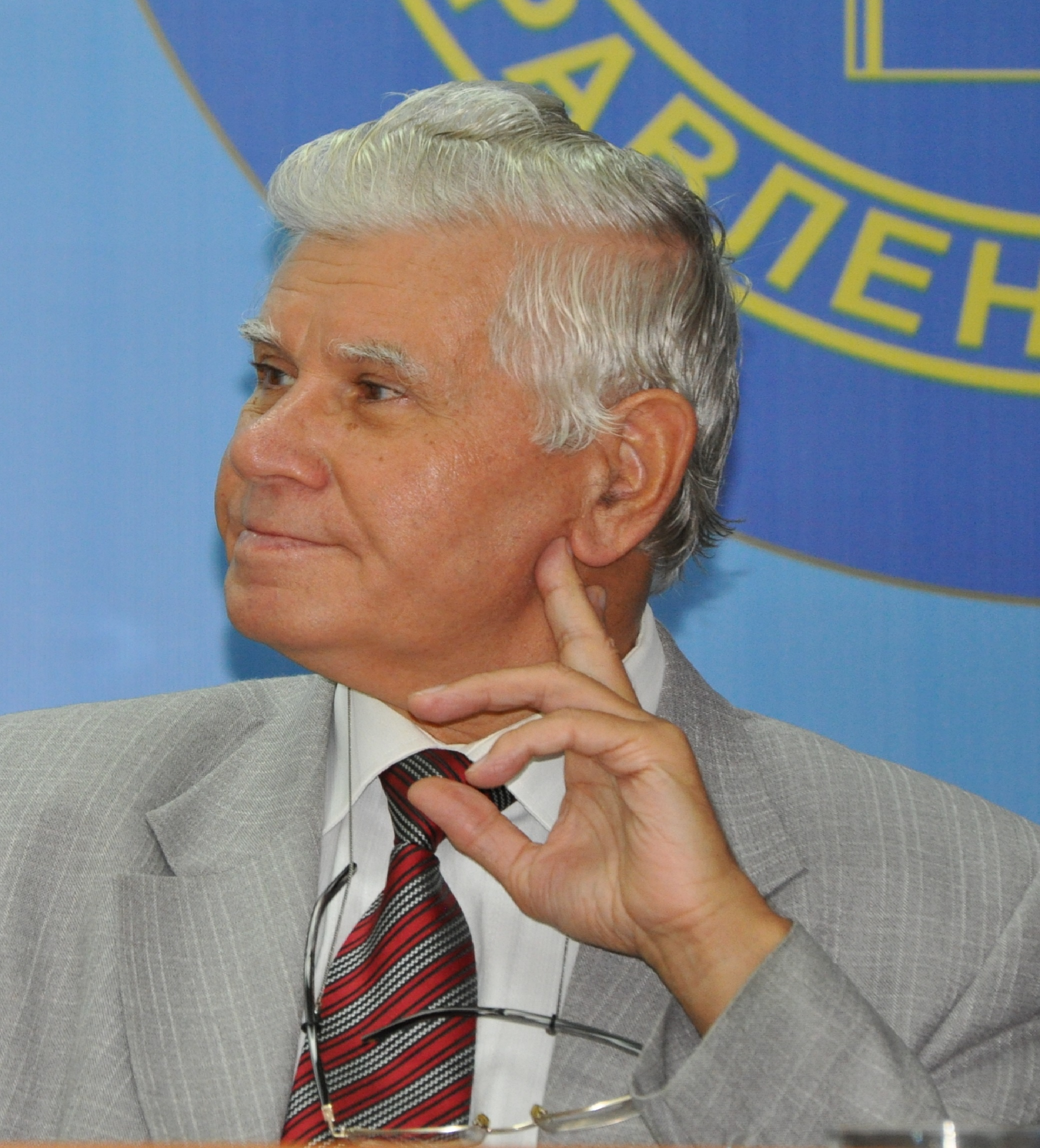 Sergey Khoruzhy, a prominent Russian philosopher